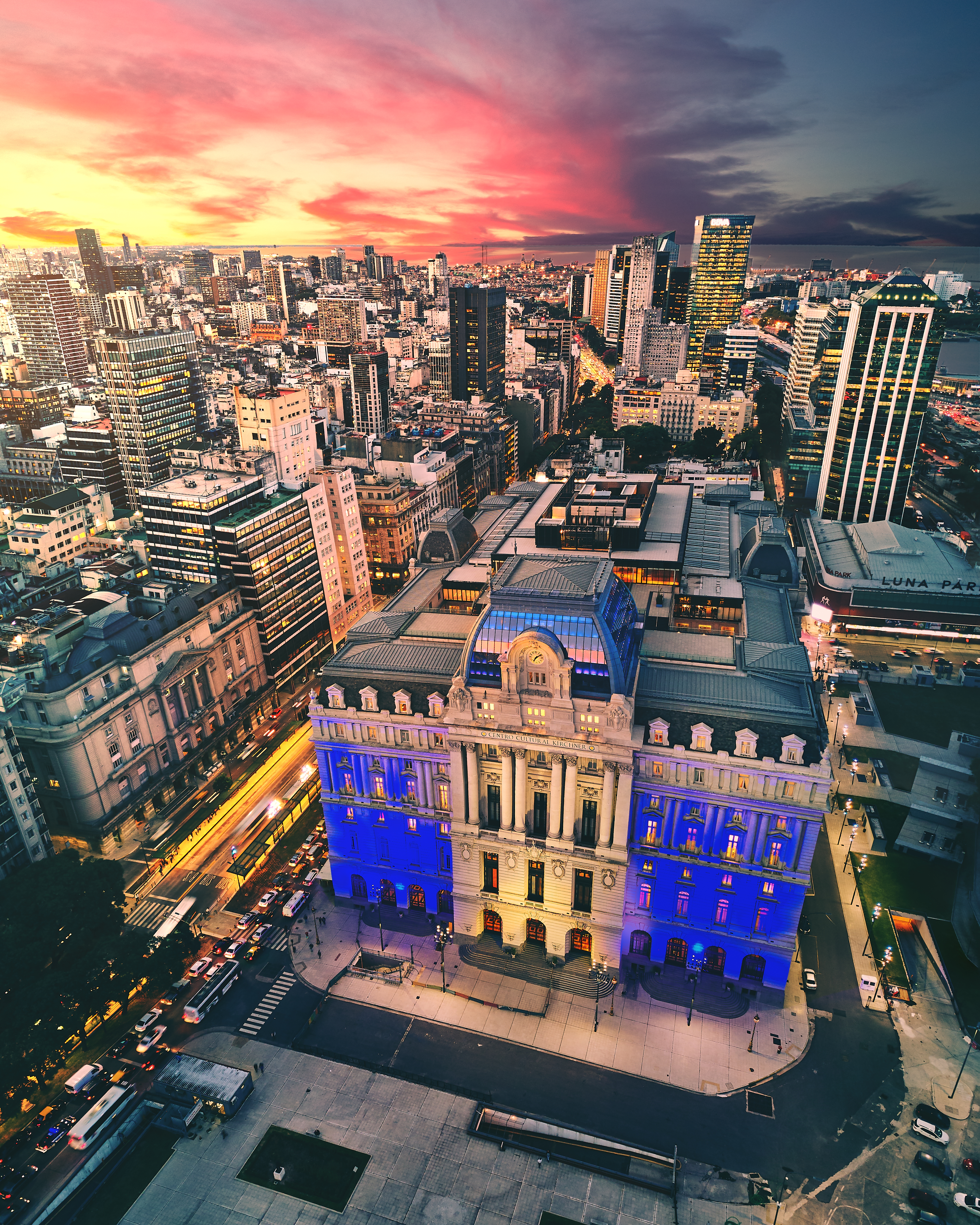 Centro Cultural Kirchner